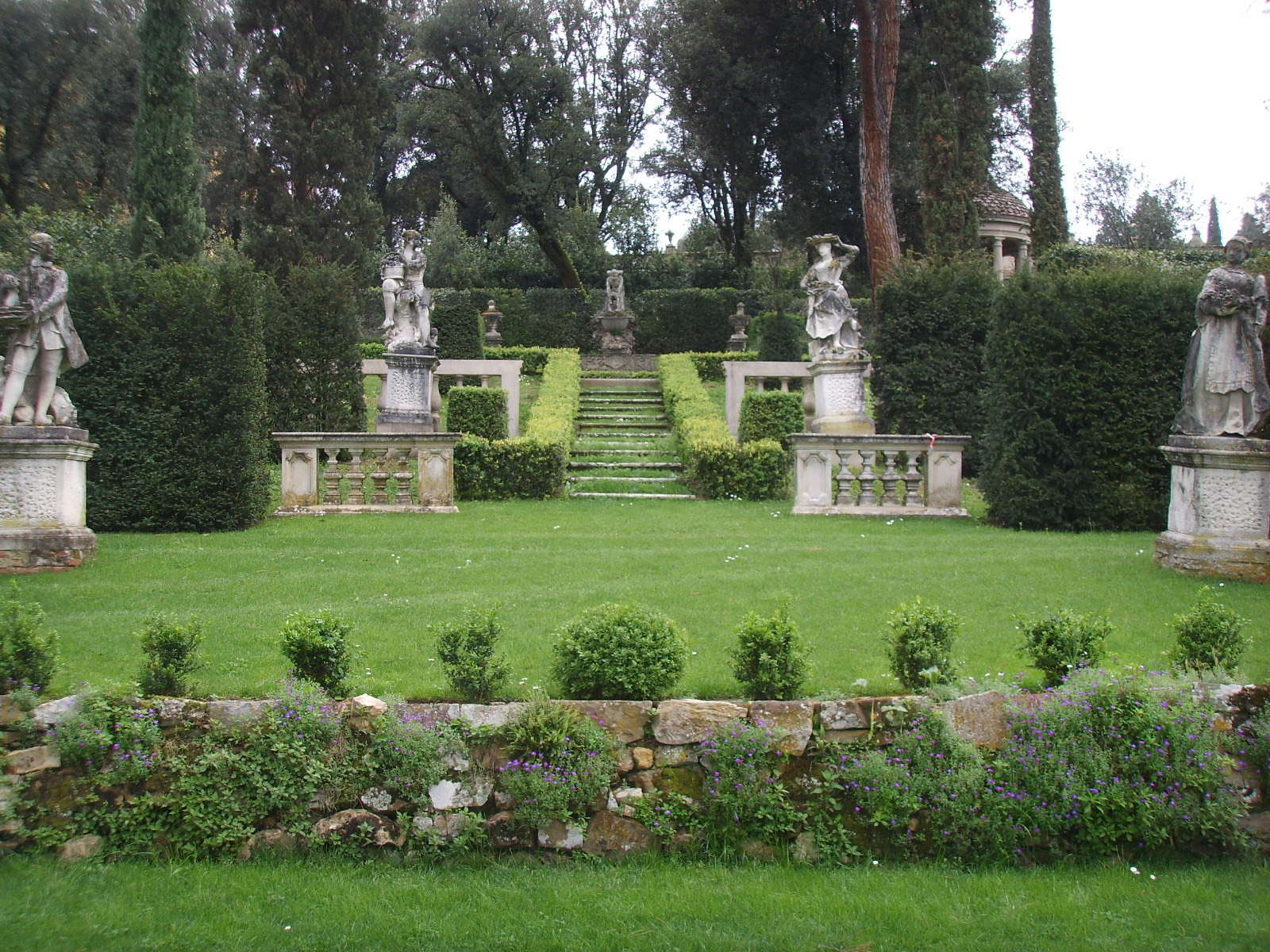 Villa la pietra, giardino est, teatrino di verzura